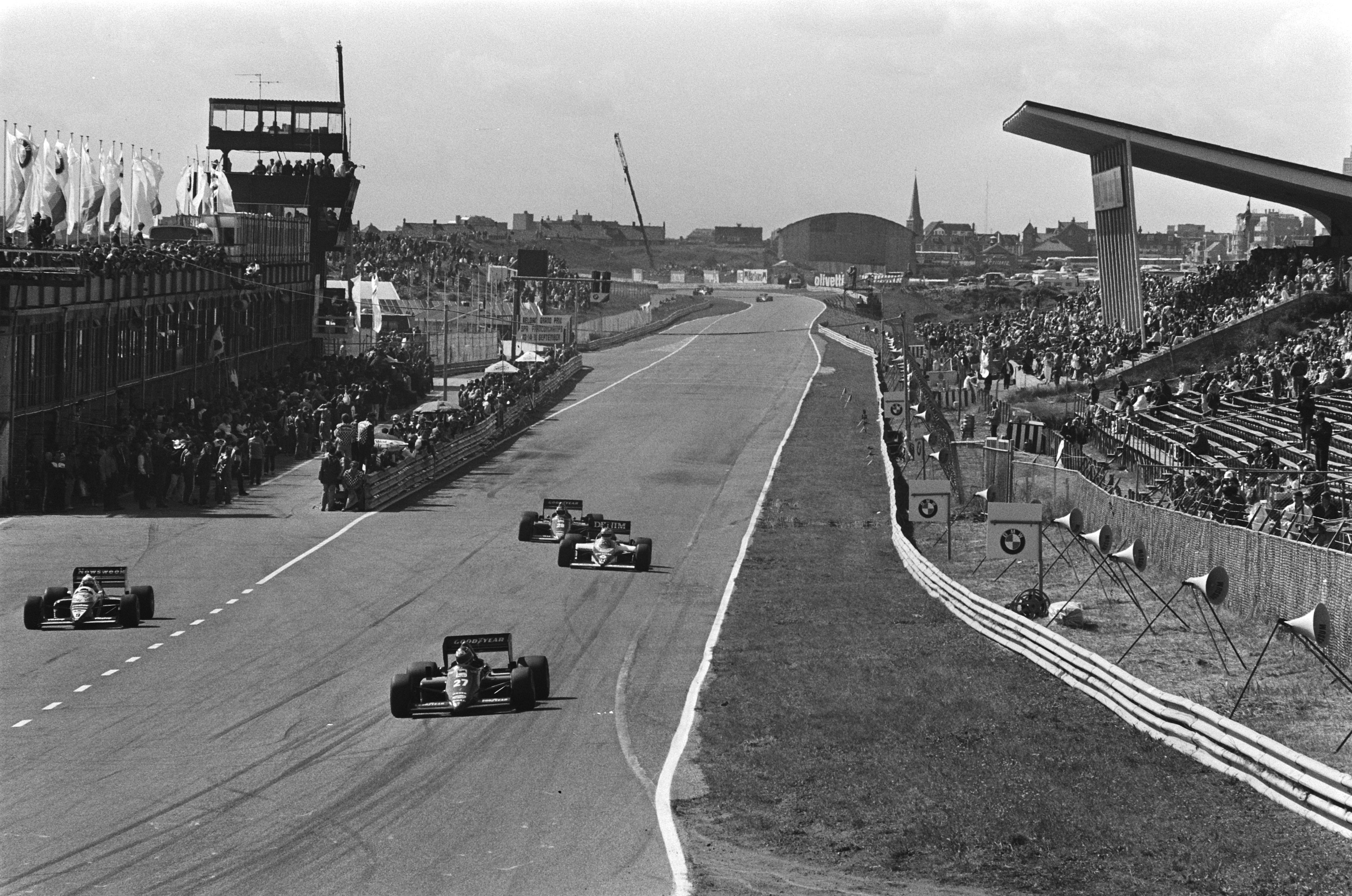 Grote Prijs van Nederland Formule I op Zandvoort; overzicht met tribune.